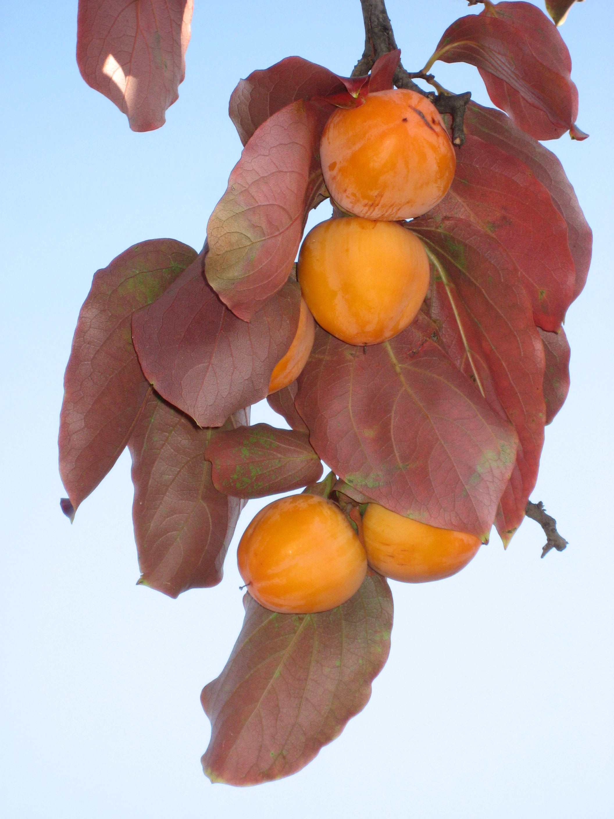 Diospyros kaki in Serres d'Auteuil Map: 48° 50' 49" N 2° 15' 8" E